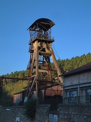 Chevalement de l'ancienne mine de la Grand-Combe (Gard) au puits Ricard, actuelle maison du mineur